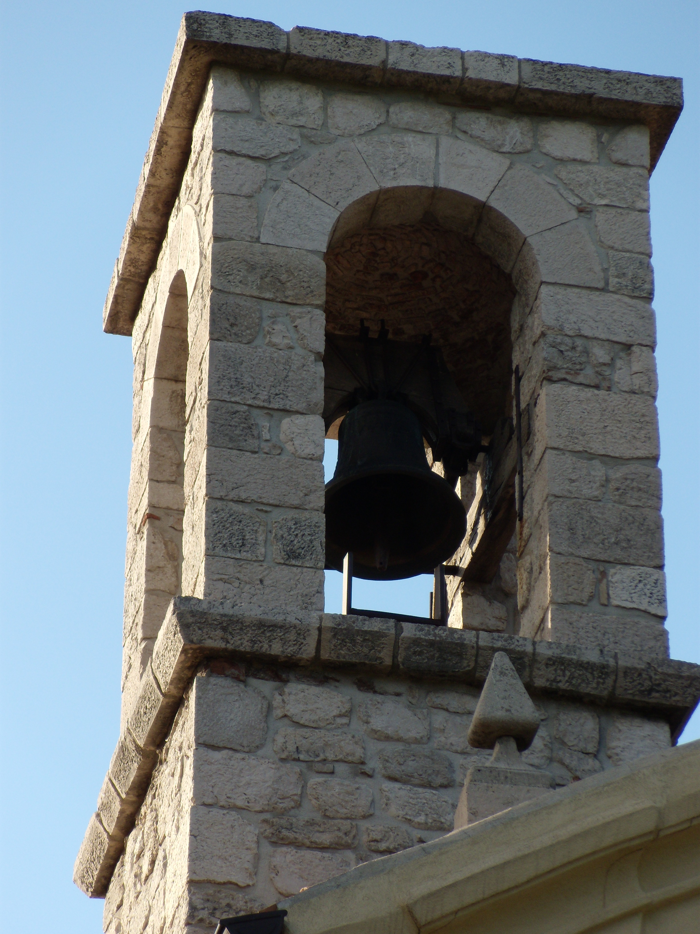 Particolare del campanile della Chiesa di Santa Maria del Castagneto in Cusano Mutri (Italia).